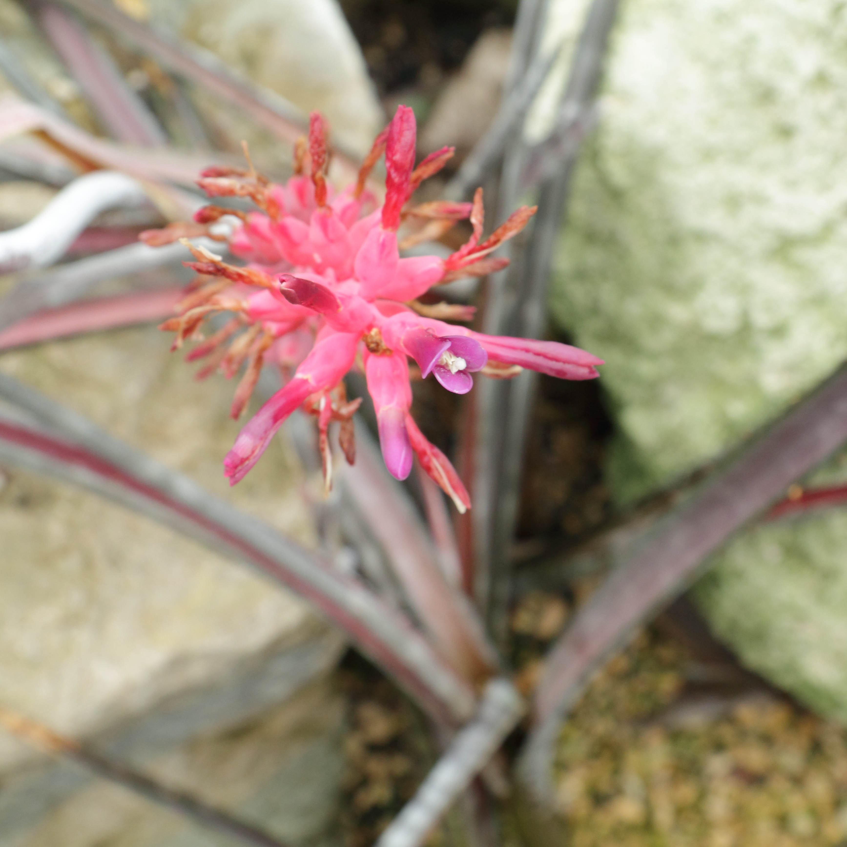 Neoglaziovia variegata, identifierad med hjälp av befintlig skylt vid Kew Gardens, London.